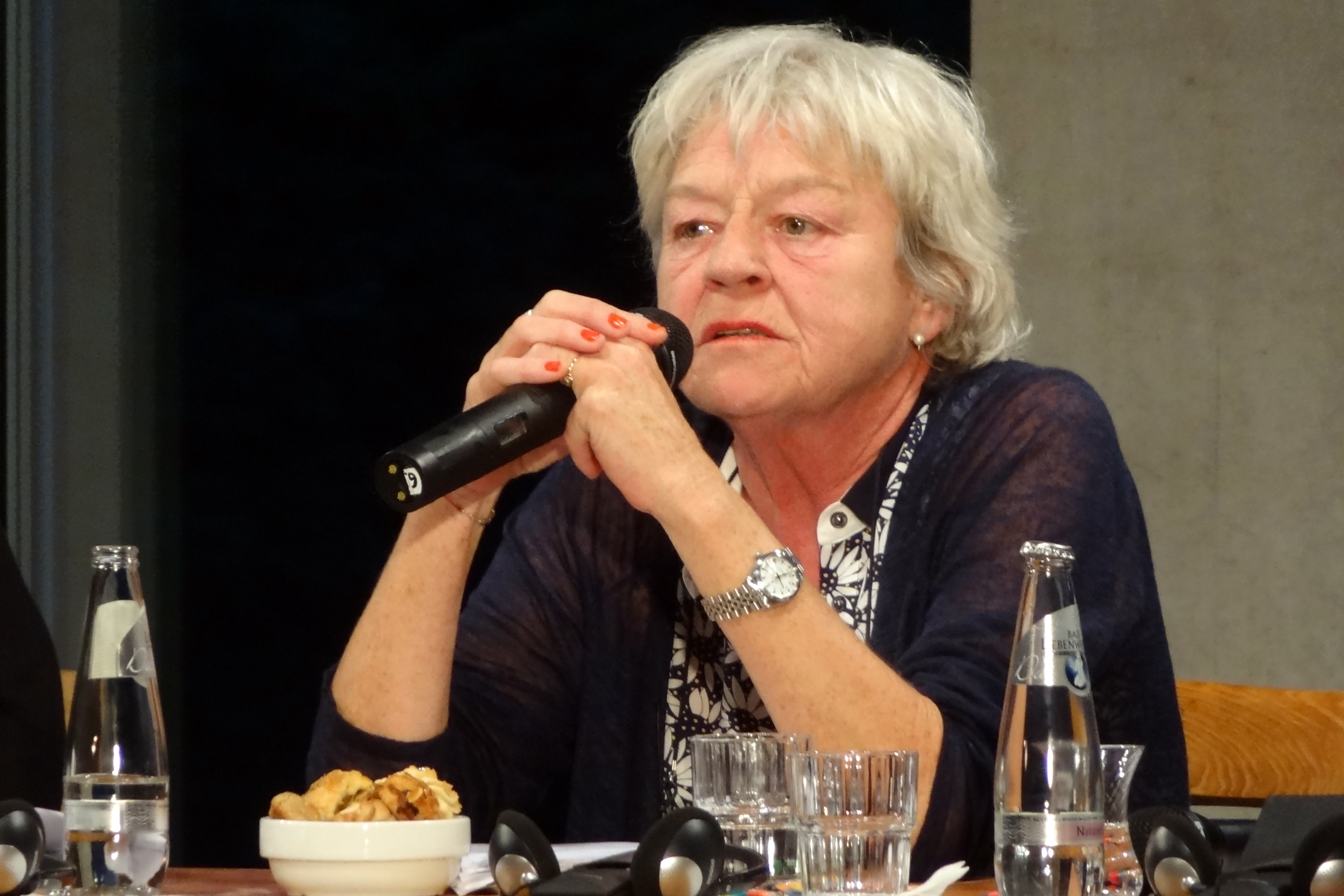 Frie Leysen, Kuratorin, Belgien